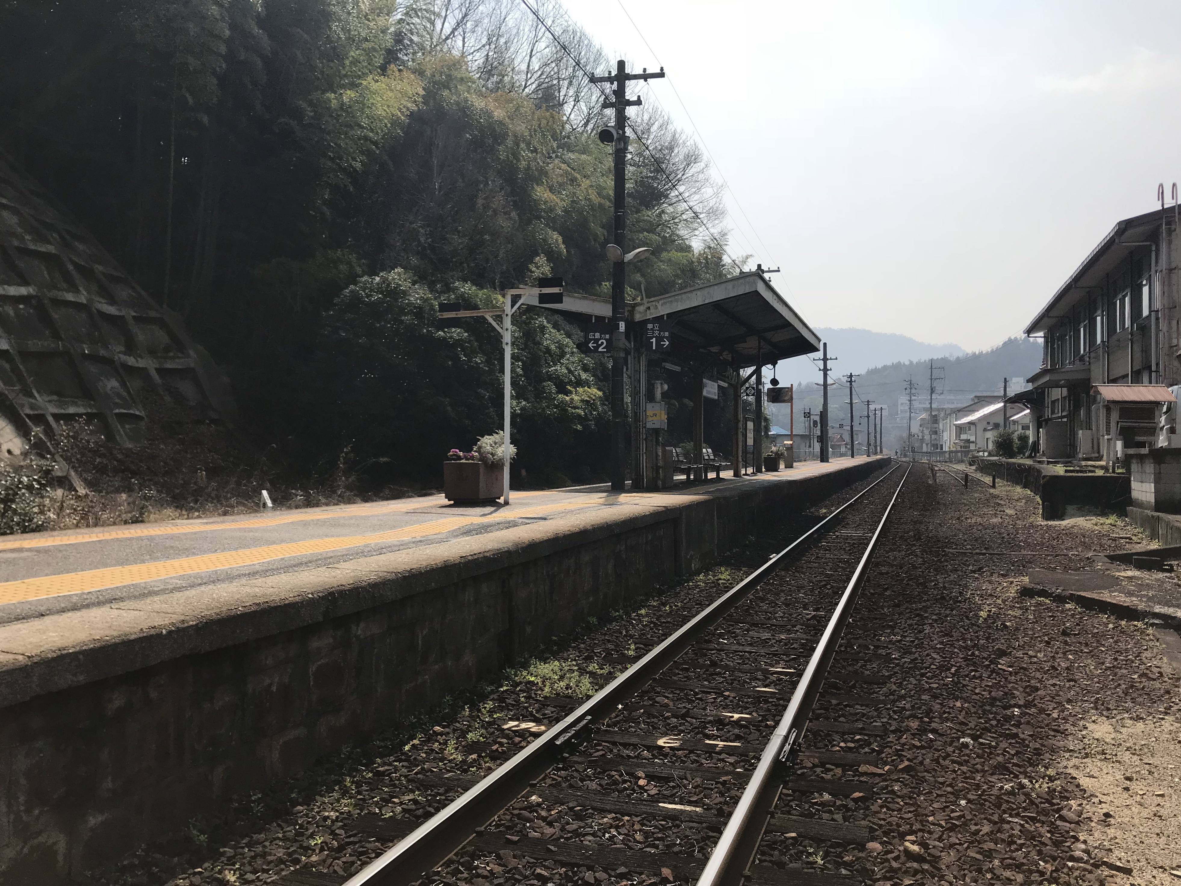 志和口駅のホーム(奥は上三田方面)